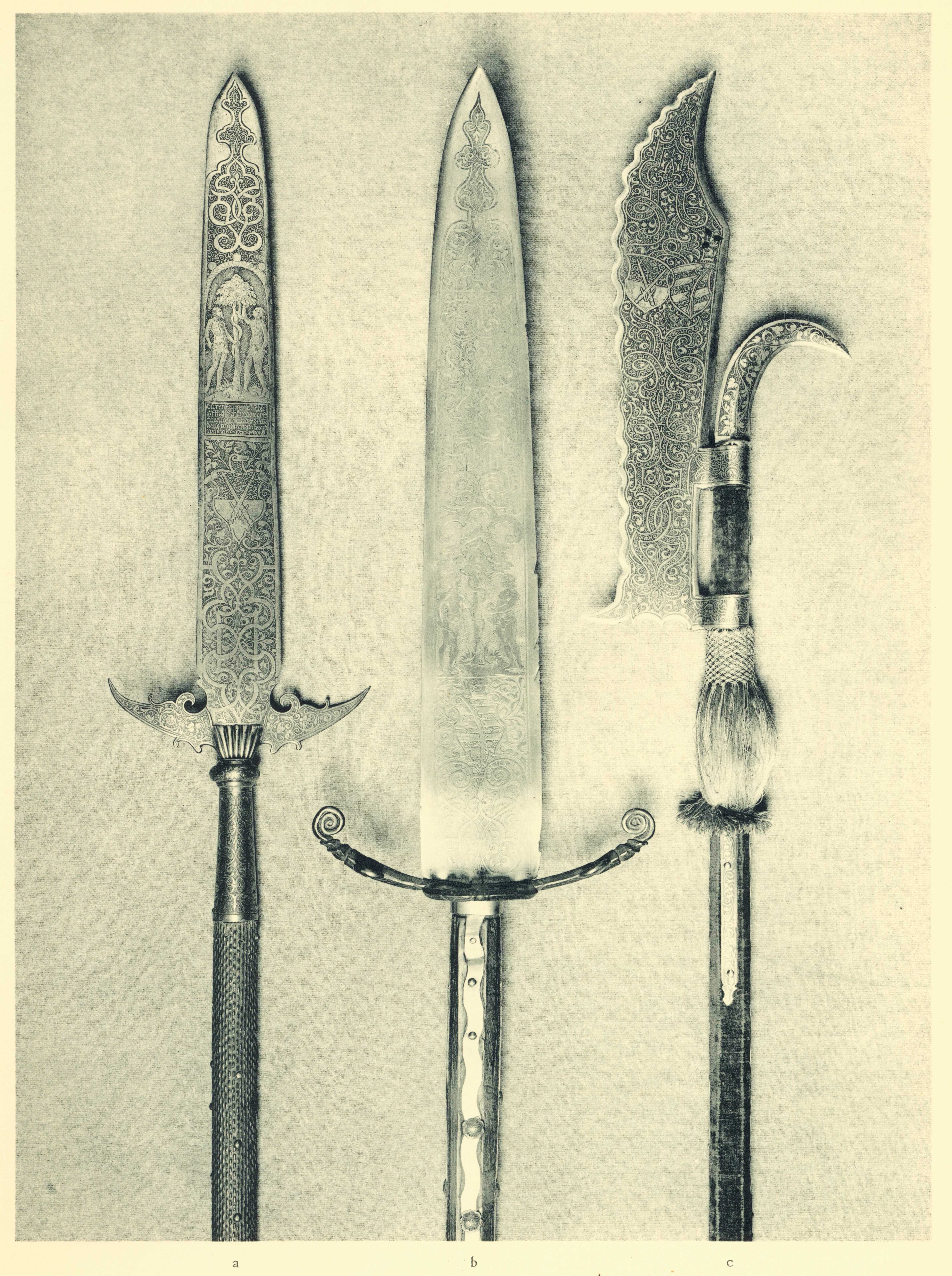 Kursächsische Partisanen und Gläfe des 16. Jahrhunderts